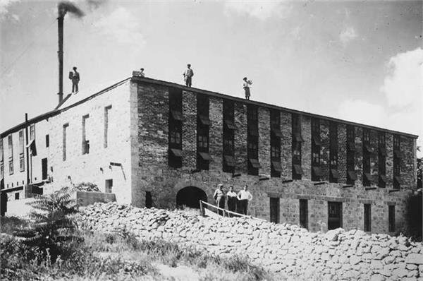 בית חרושת ללבנים במוצא